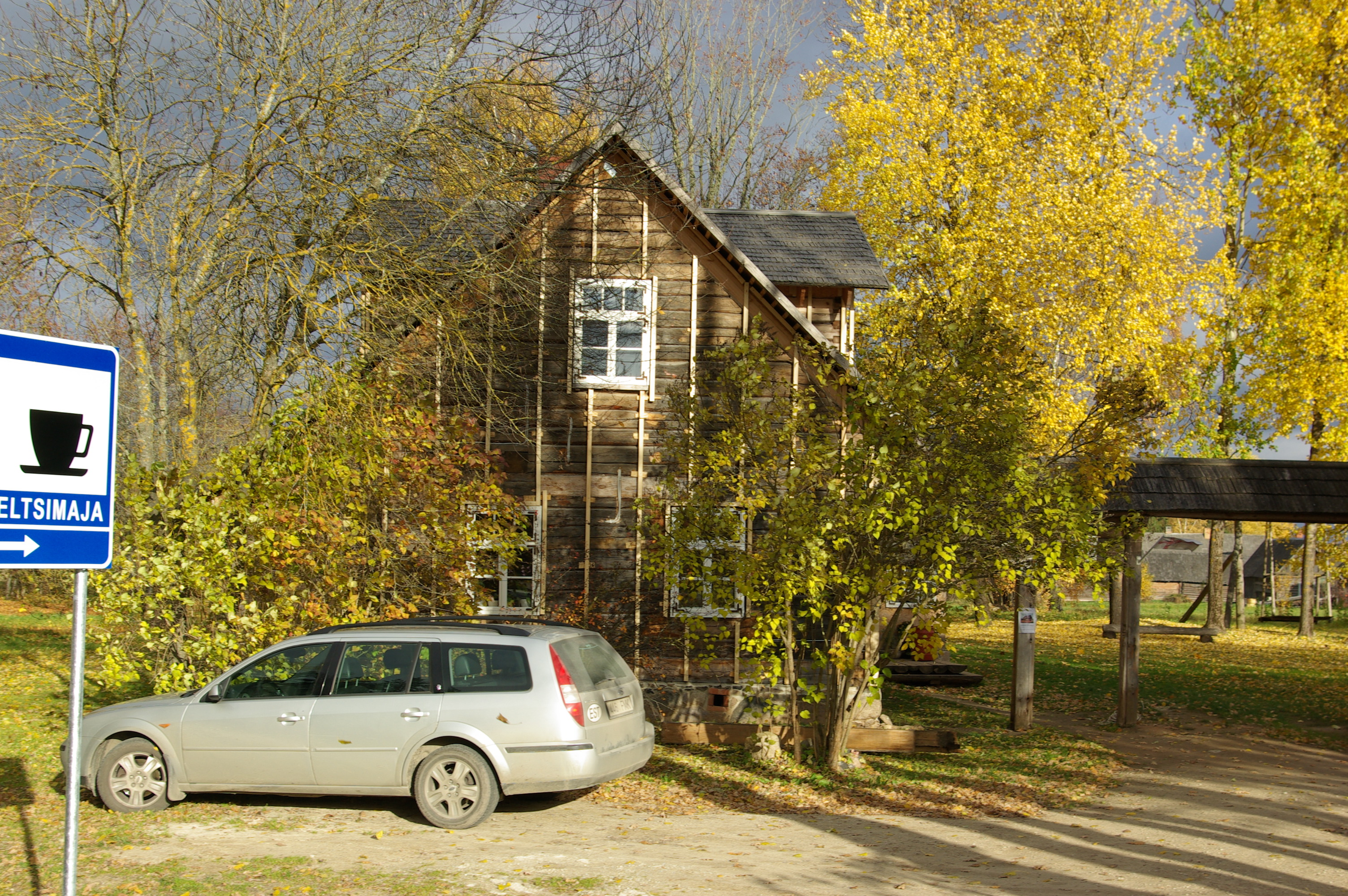 Obinitsa seltsimaja